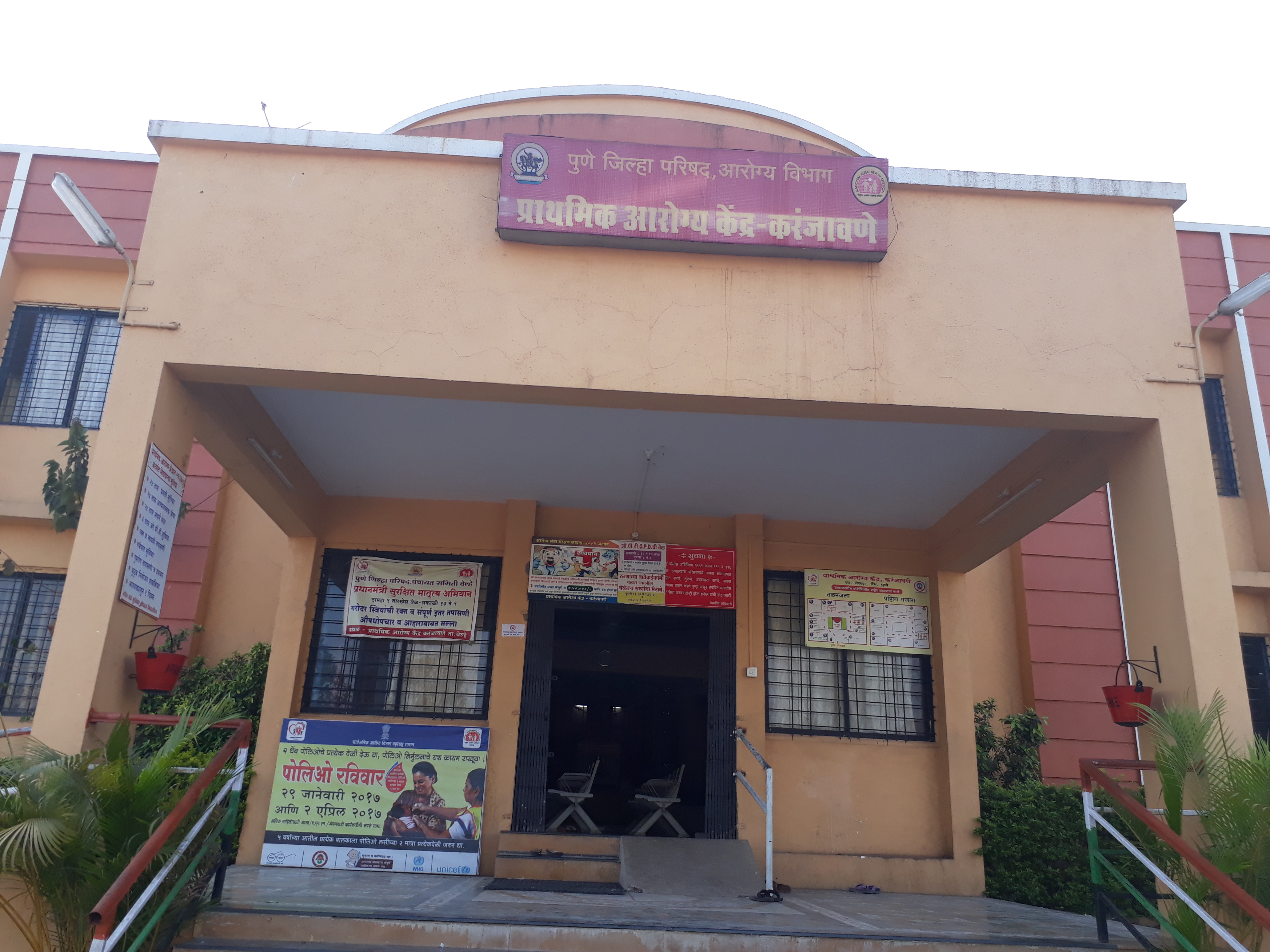 करंजावणे आरोग्य केंद्र